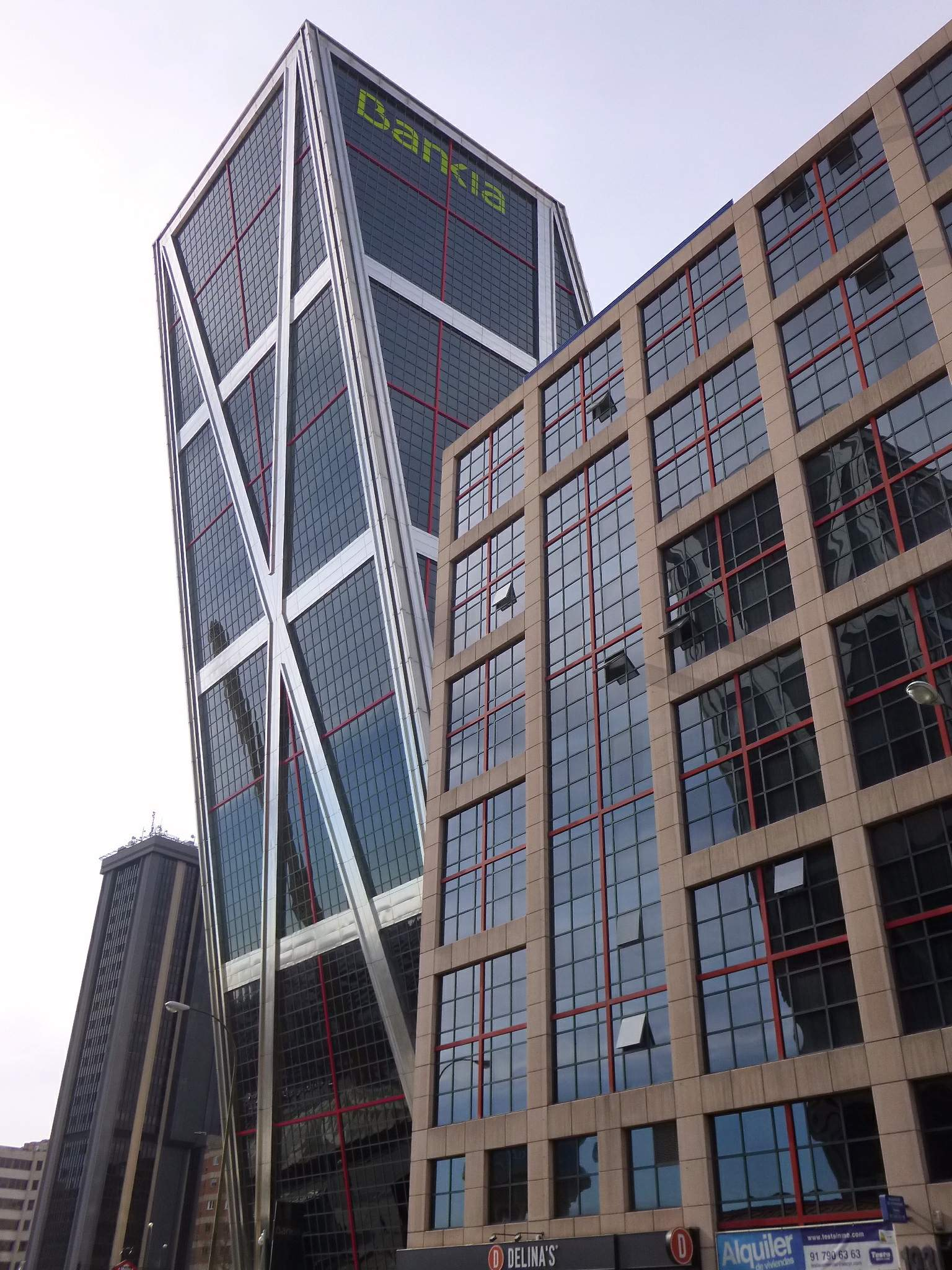 Madrid - Hotel Puerta Castilla y Puerta de Europa